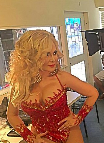 Lourdes Chacon, La Vedette de Puerto Rico en 2017